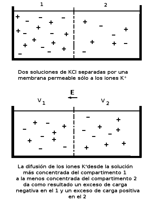 Esquema sobre el potencial de Nernst; cubetas con KCl separadas por una membrana semipermeable.